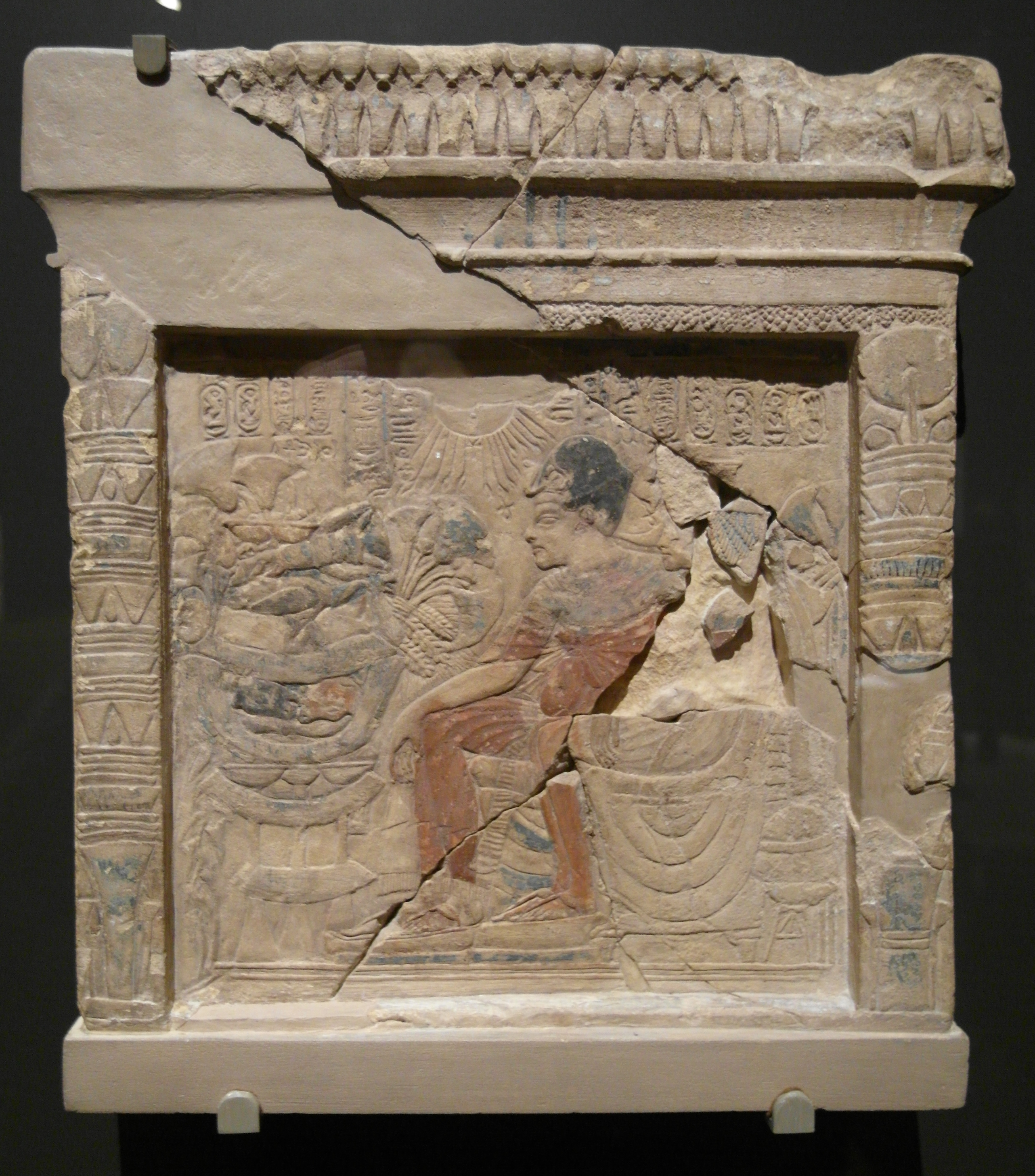 Estela caliza con el faraón Amenhotep III y la reina Tiye ante ofrendas de flores y comida, iluminados por el dios solar Atón. Dinastía XVIII, reinado de Ajenatón (hacia 1352-1336 a. C.). Casa R 442, Tell el-Amarna. EA 57399.